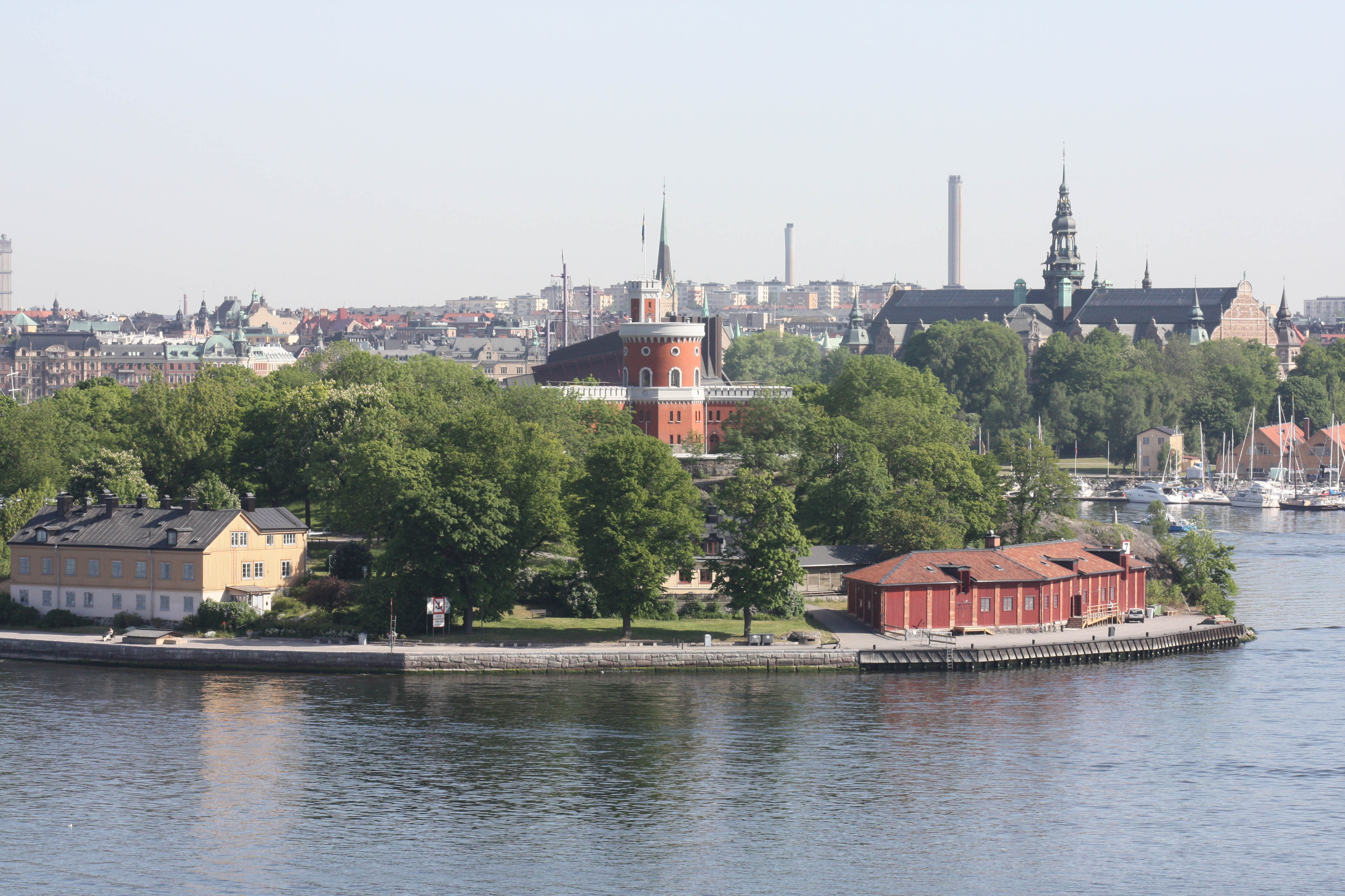 Panorama da Fjällgatan: Kastellholmen